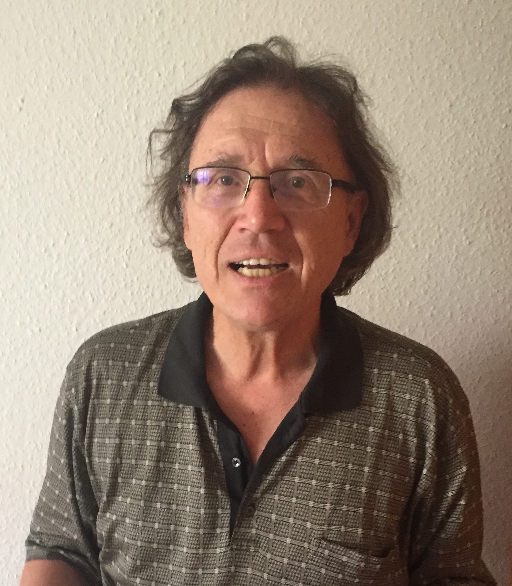 Erhard Brunn als engagierter Verfechter des interkulturellen Dialogs